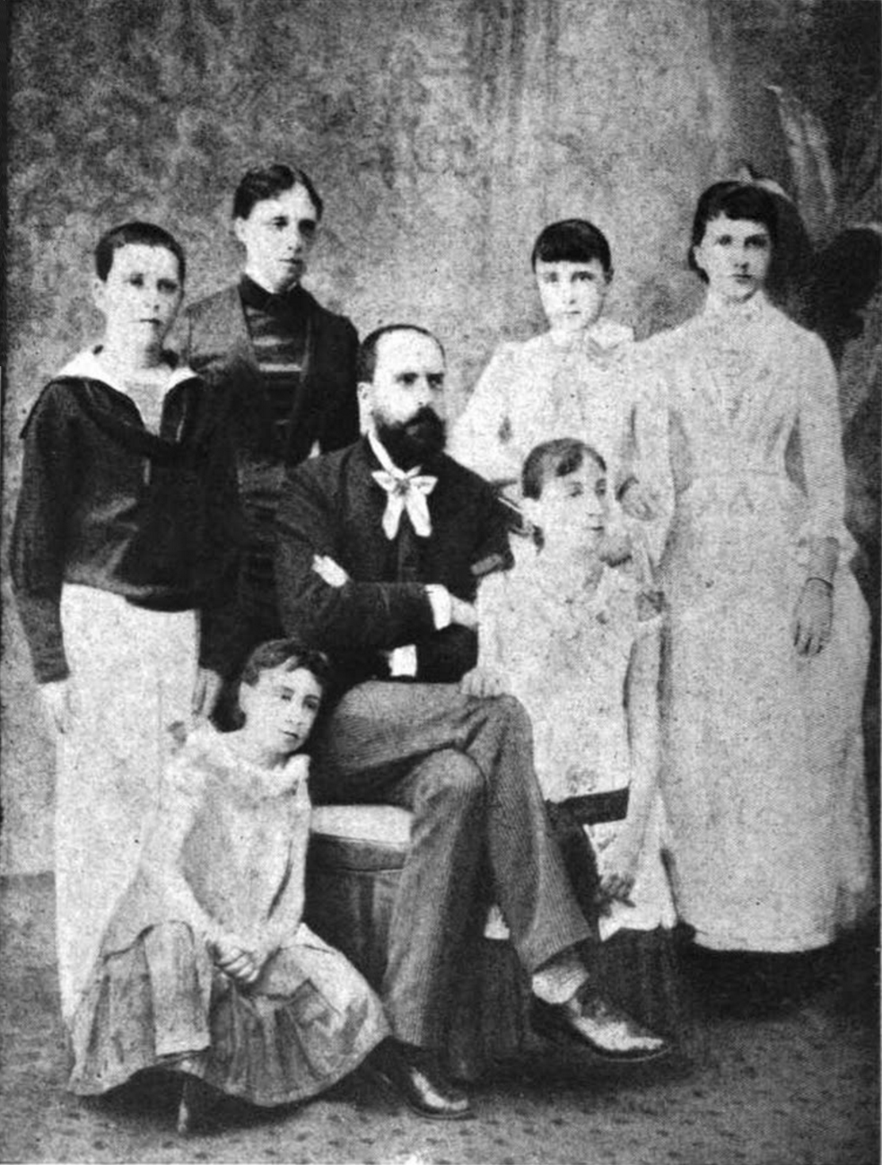 La familia real carlista. Don Carlos, doña Margarita, don Jaime y las Infantas doña Blanca, doña Elvira, doña Beatriz y doña Alicia.